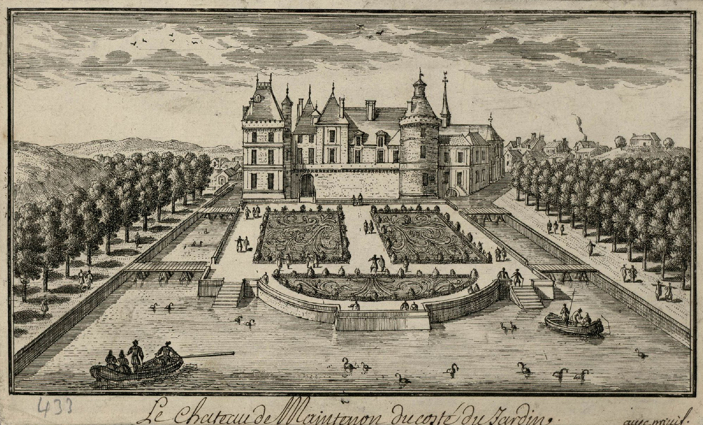 Alter Stich mit einer Ansicht des Schlosses Maintenon von Süden